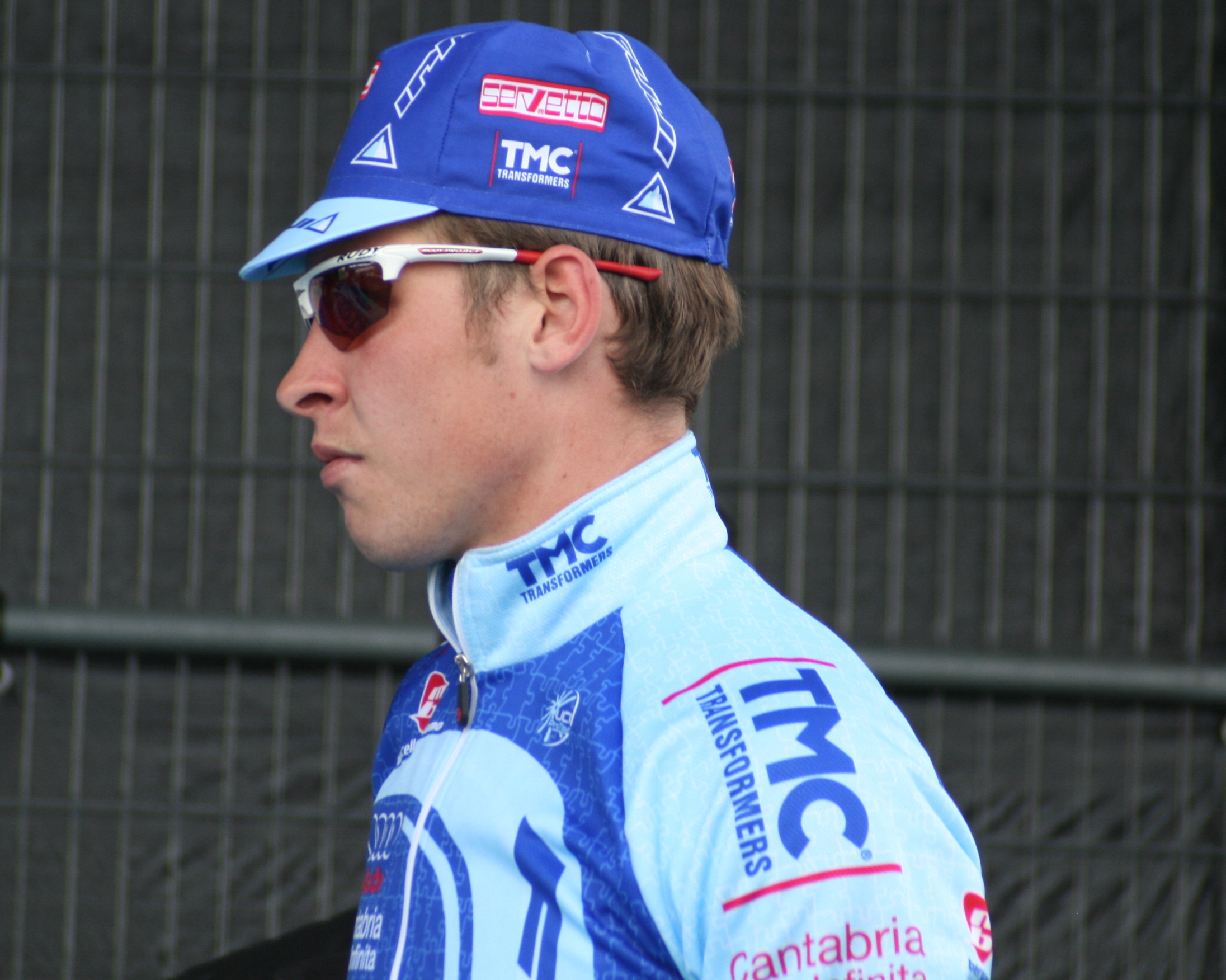 Boris Shpilevsky lors du Grand Prix E3 2009